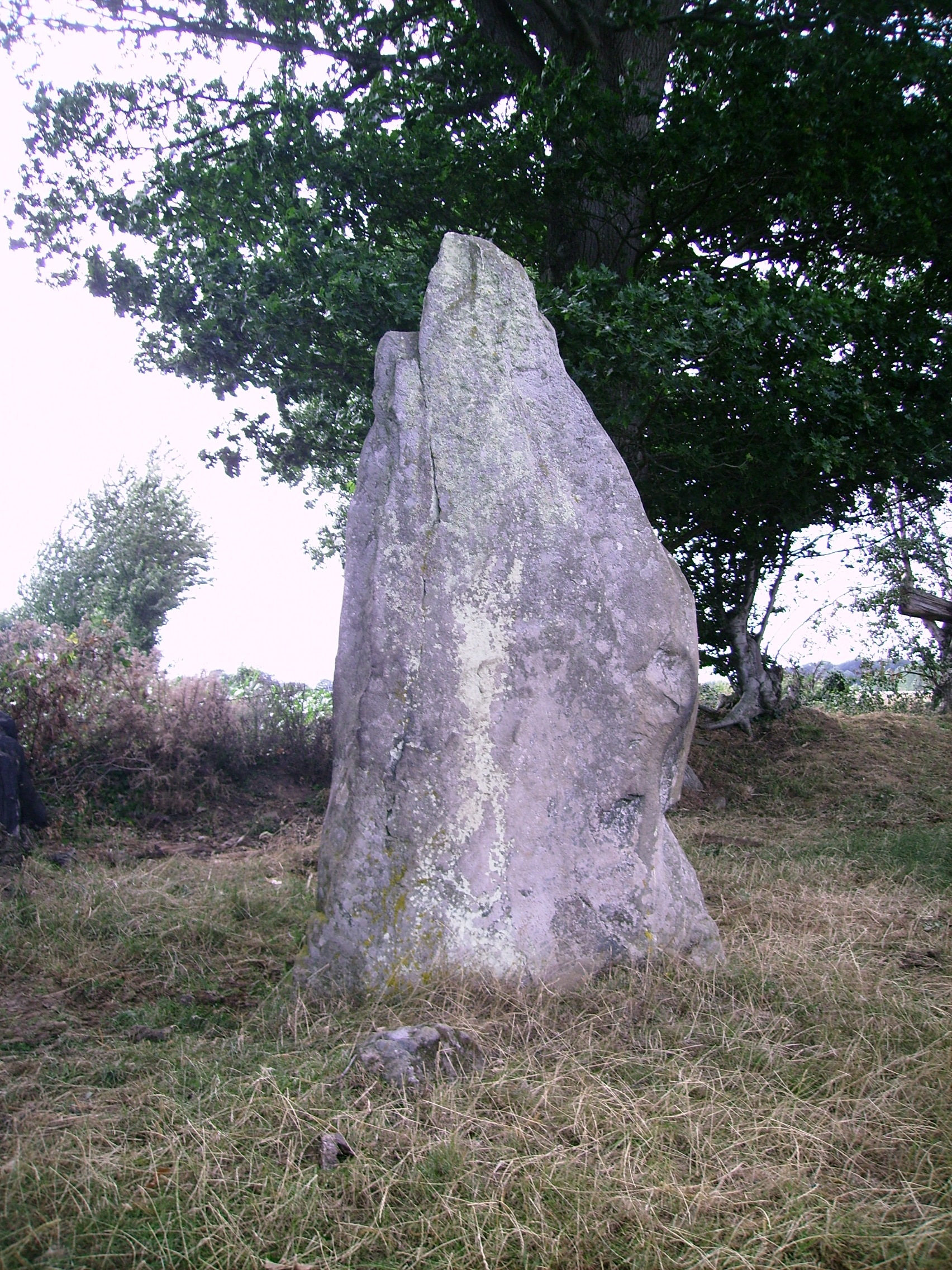 Menhir de Saint Civière de face, Le Pas, Mayenne